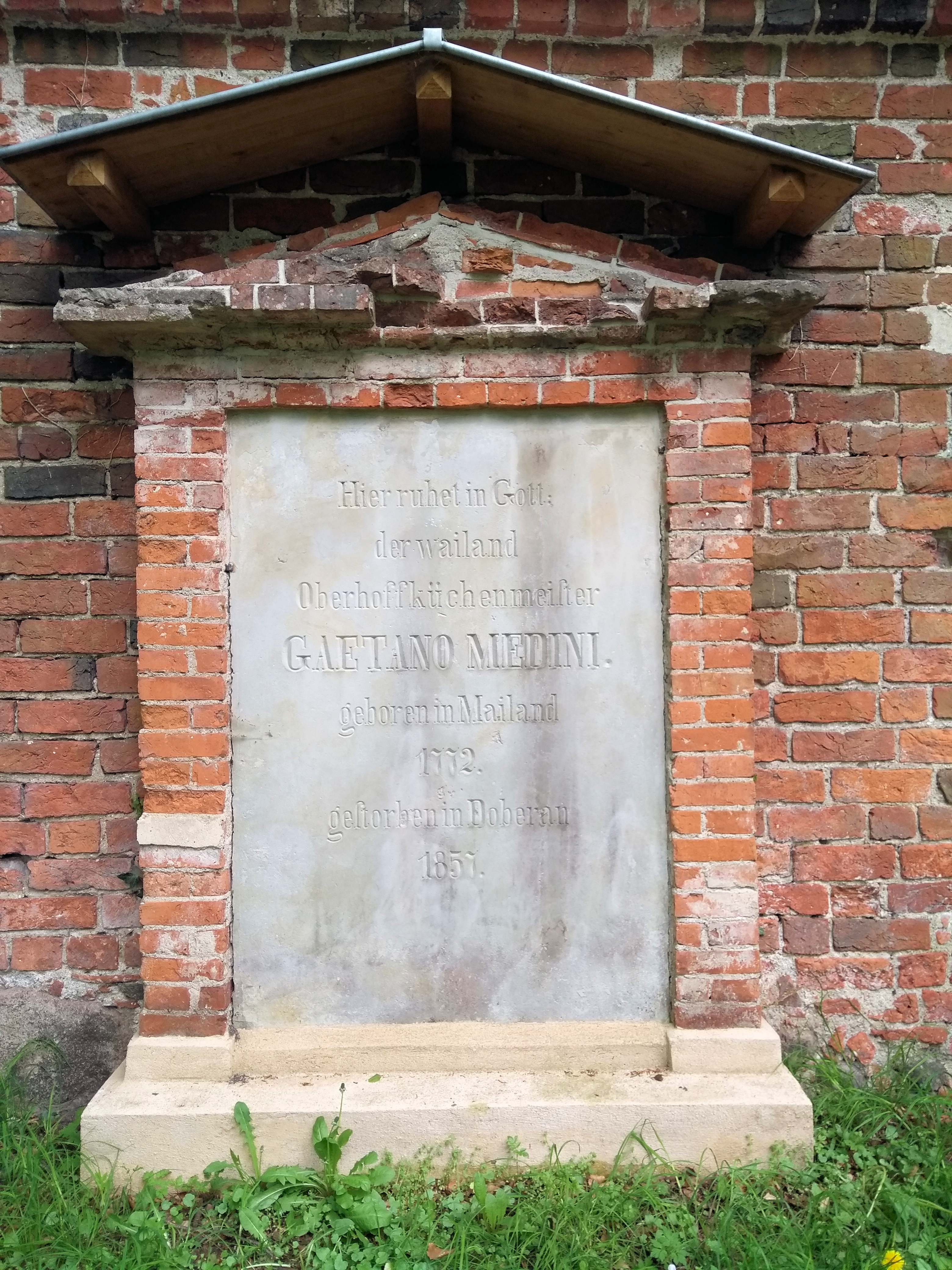 Bad Doberan Klosterfriedhof, Grabmal Gaetano Medini